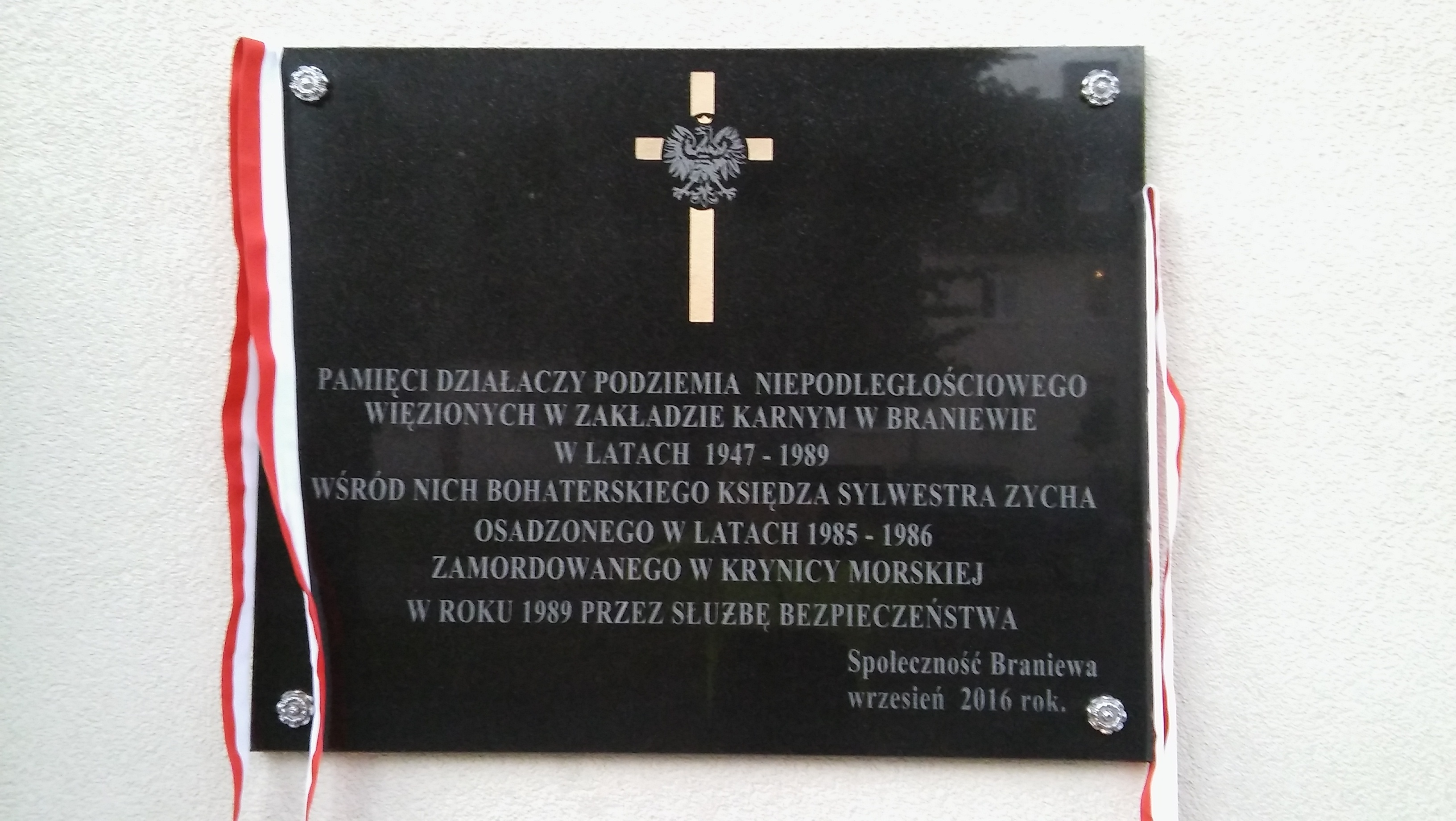 zakład karny Braniewo, Sylwester Zych.